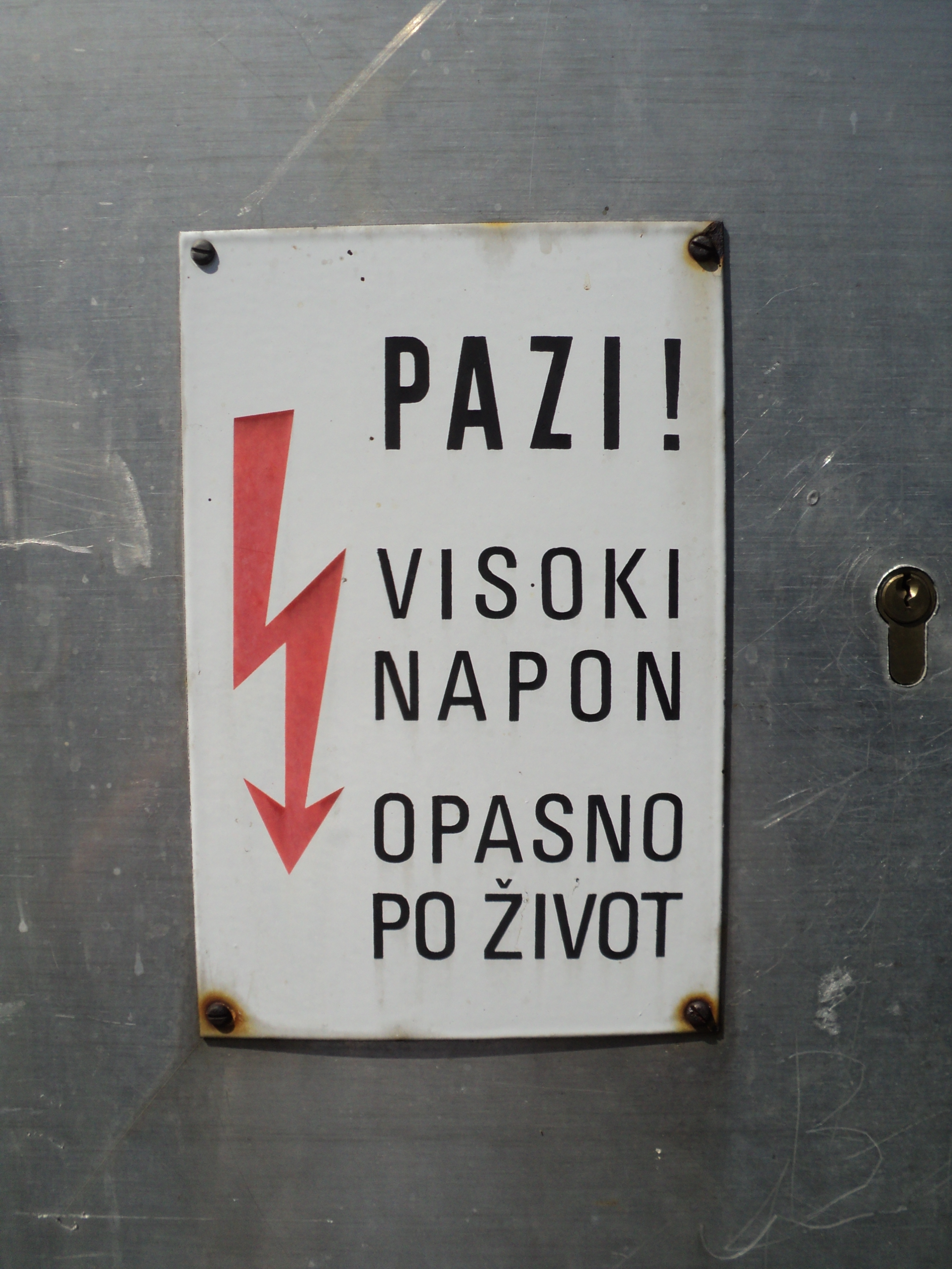 Znak Pazi Visoki Napon Opasno Po Život i crvena munja